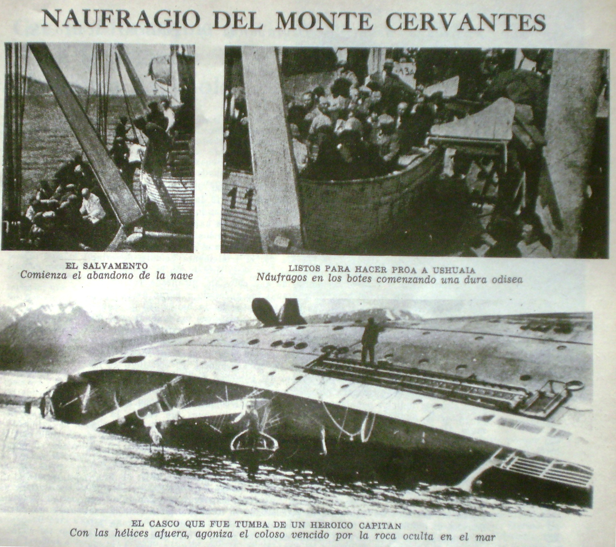 Naufragio del "Monte Cervantes" publicados por el diario La Razón